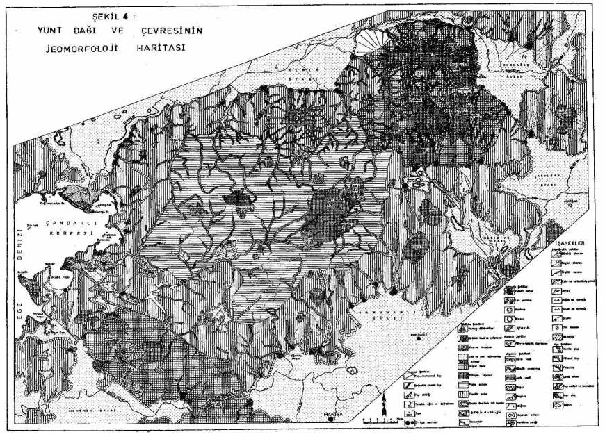 Yunt Dağı ve çevresinin jeomorfolojik haritası